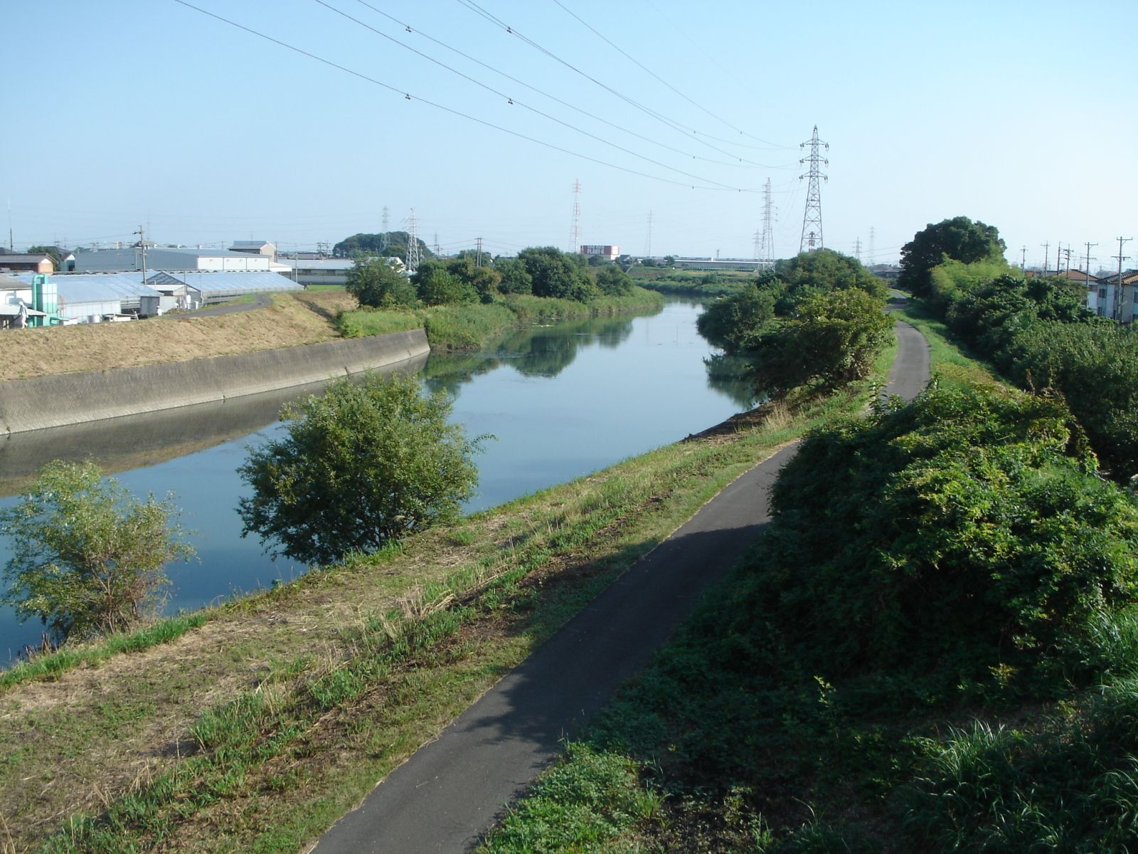 五六川、五六川（岐阜県瑞穂市、国道21号）から上流側を撮影